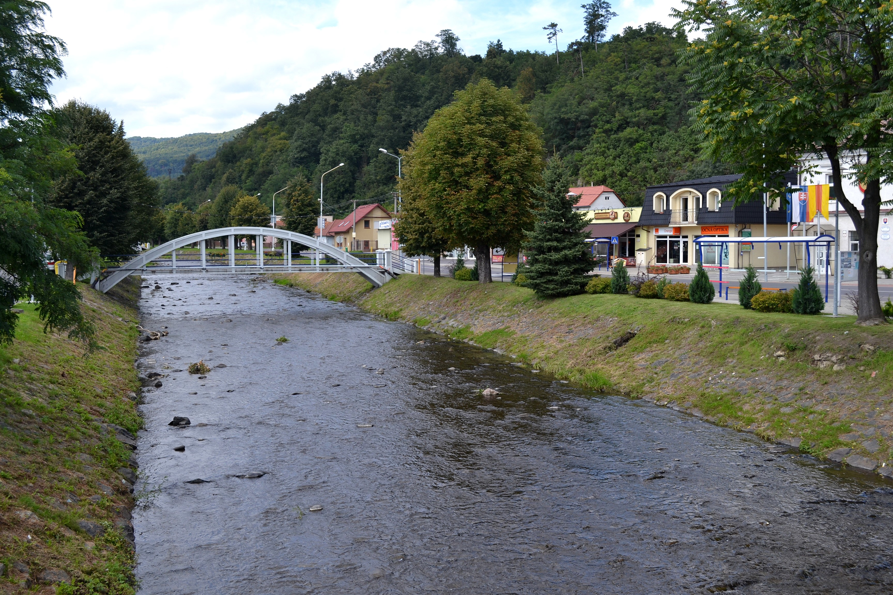 Kľacký potok preteká centrom Žarnovice